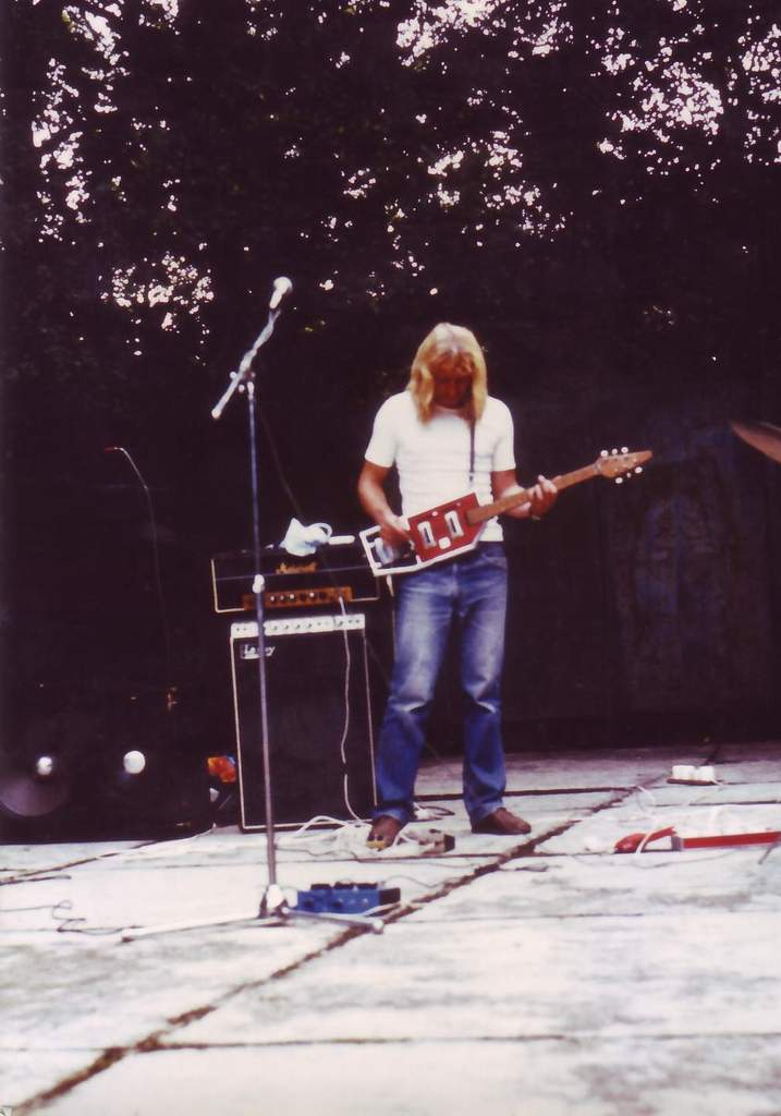 A zenekar tagjairól készült felvétel.